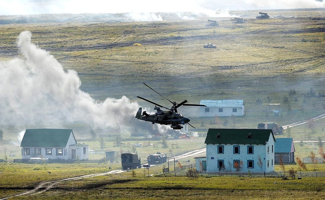 Полигон Чебаркуль. Стратегические военные учения «Центр-2011».